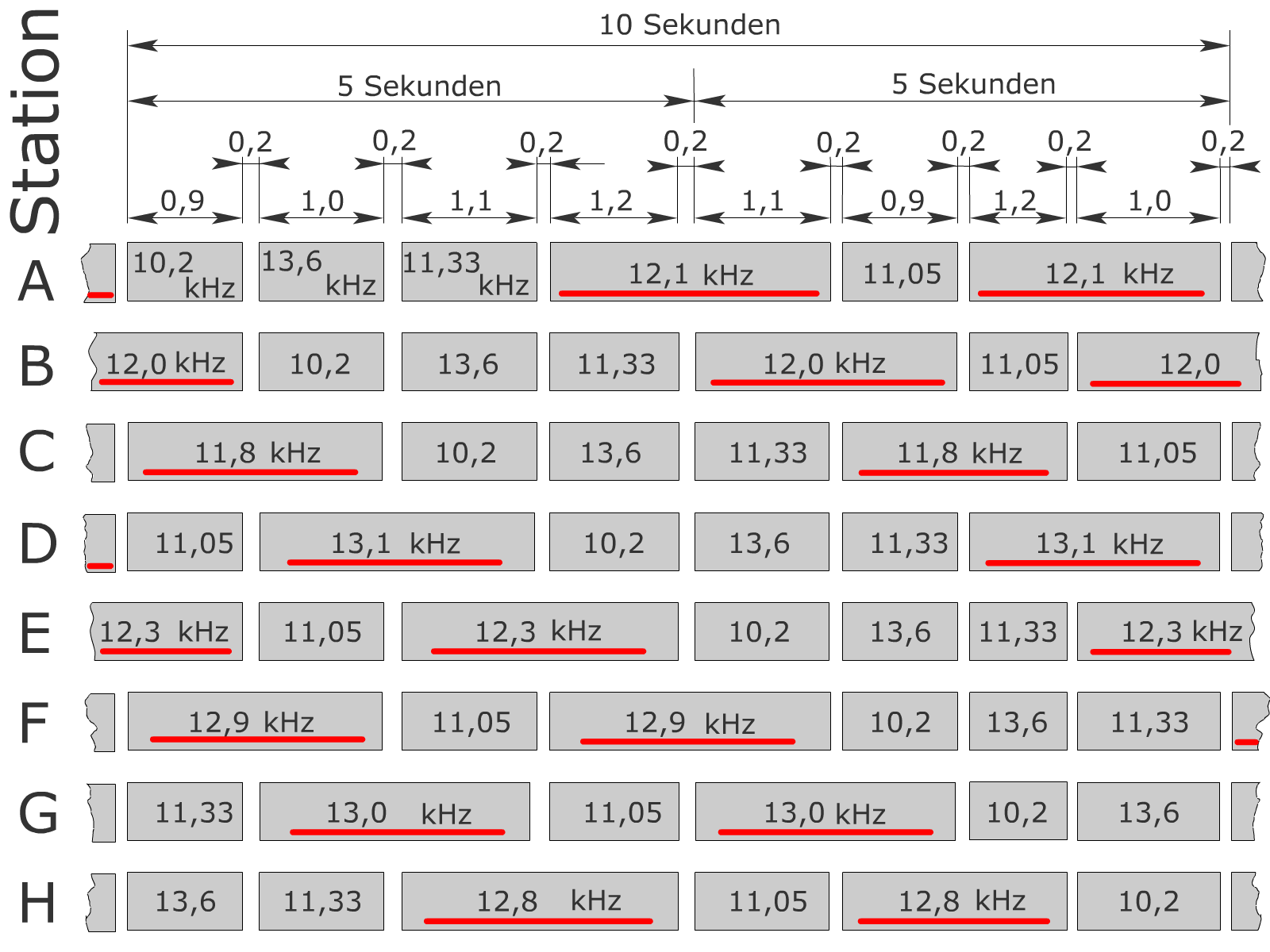 Omega-Navigationssystem, Frequenztabelle, Intervalltabelle